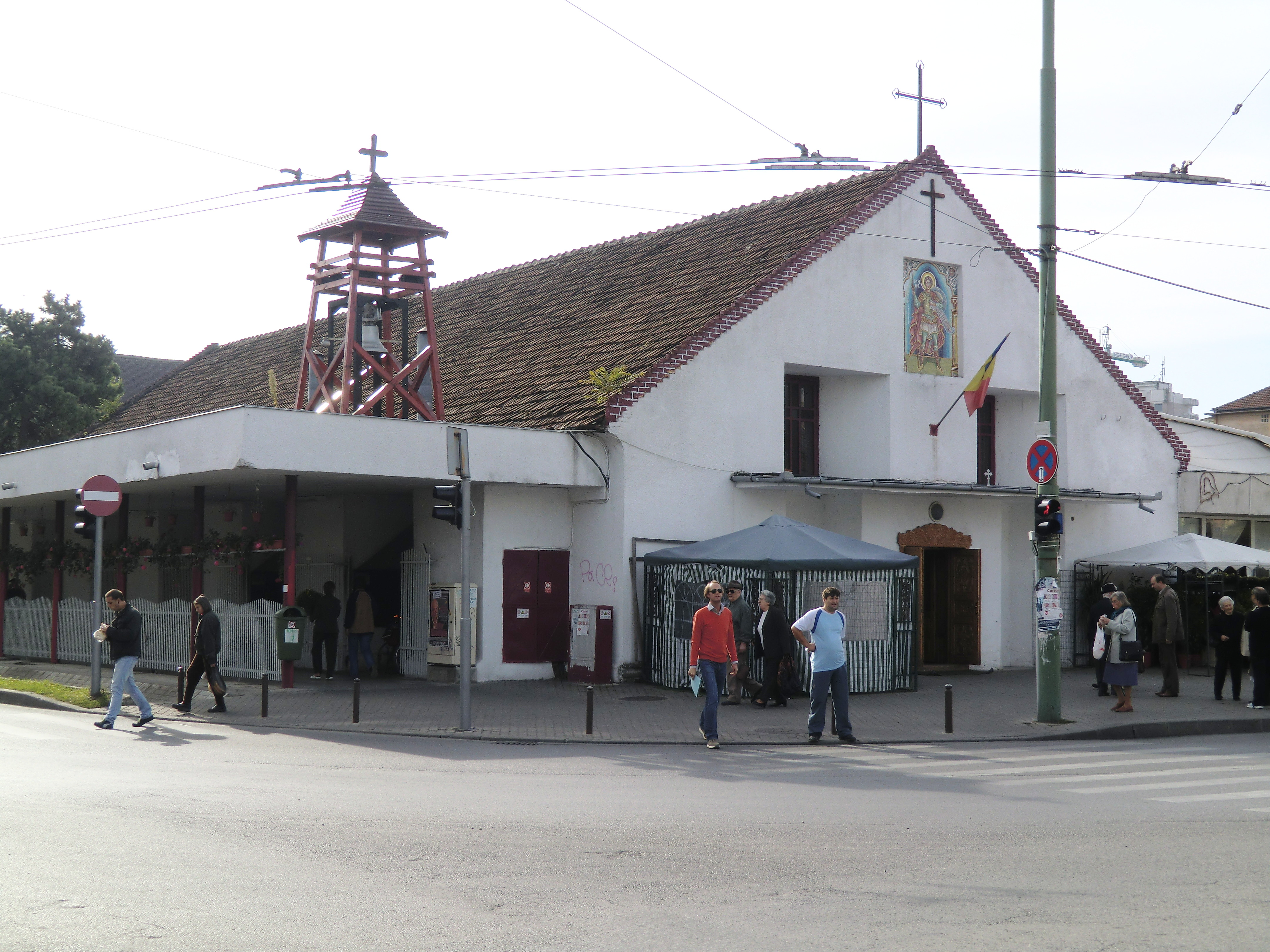 Militärkapelle Piata 700